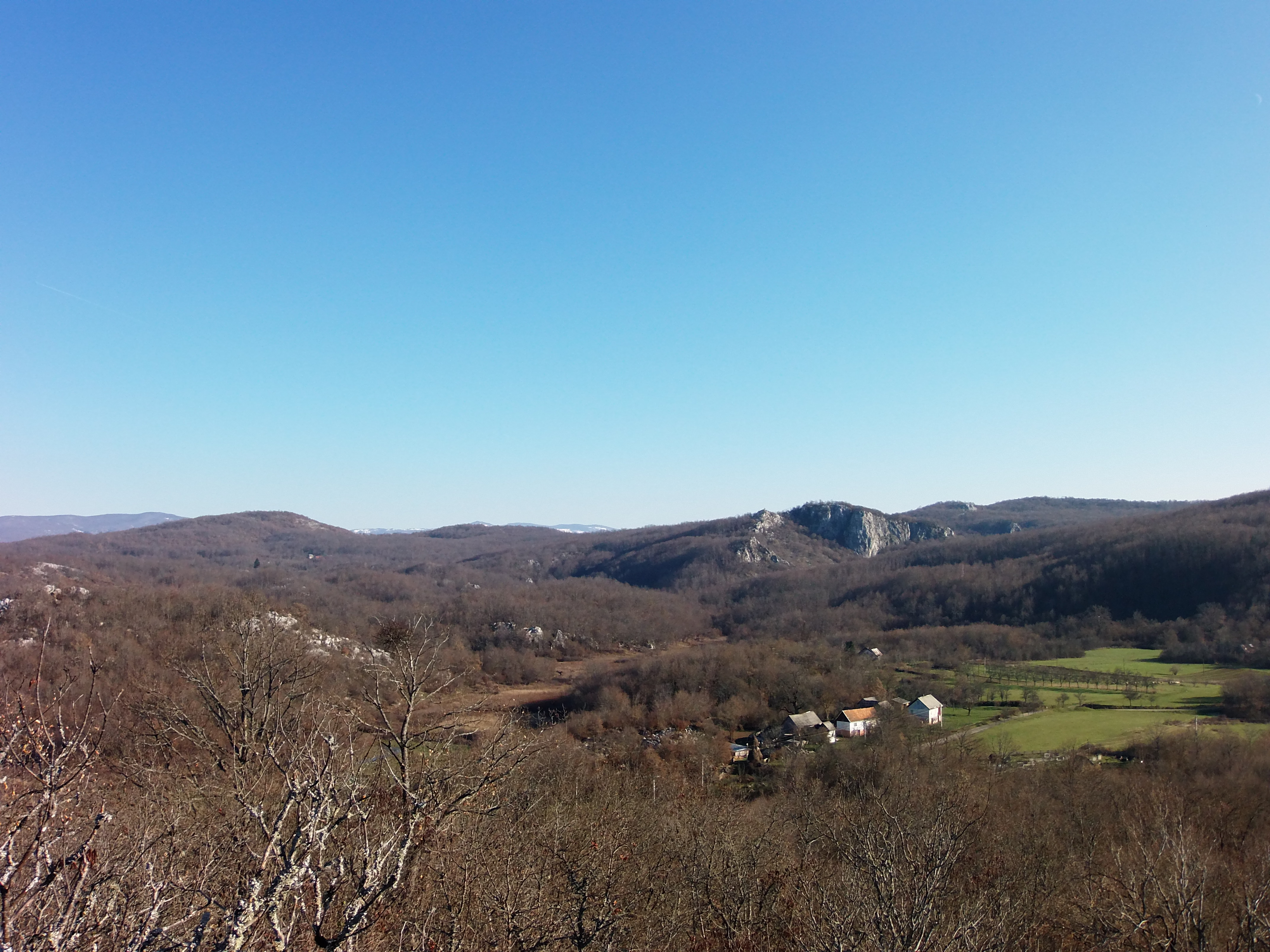 Поглед на Пољан са Пражина вршчића (Млаква)